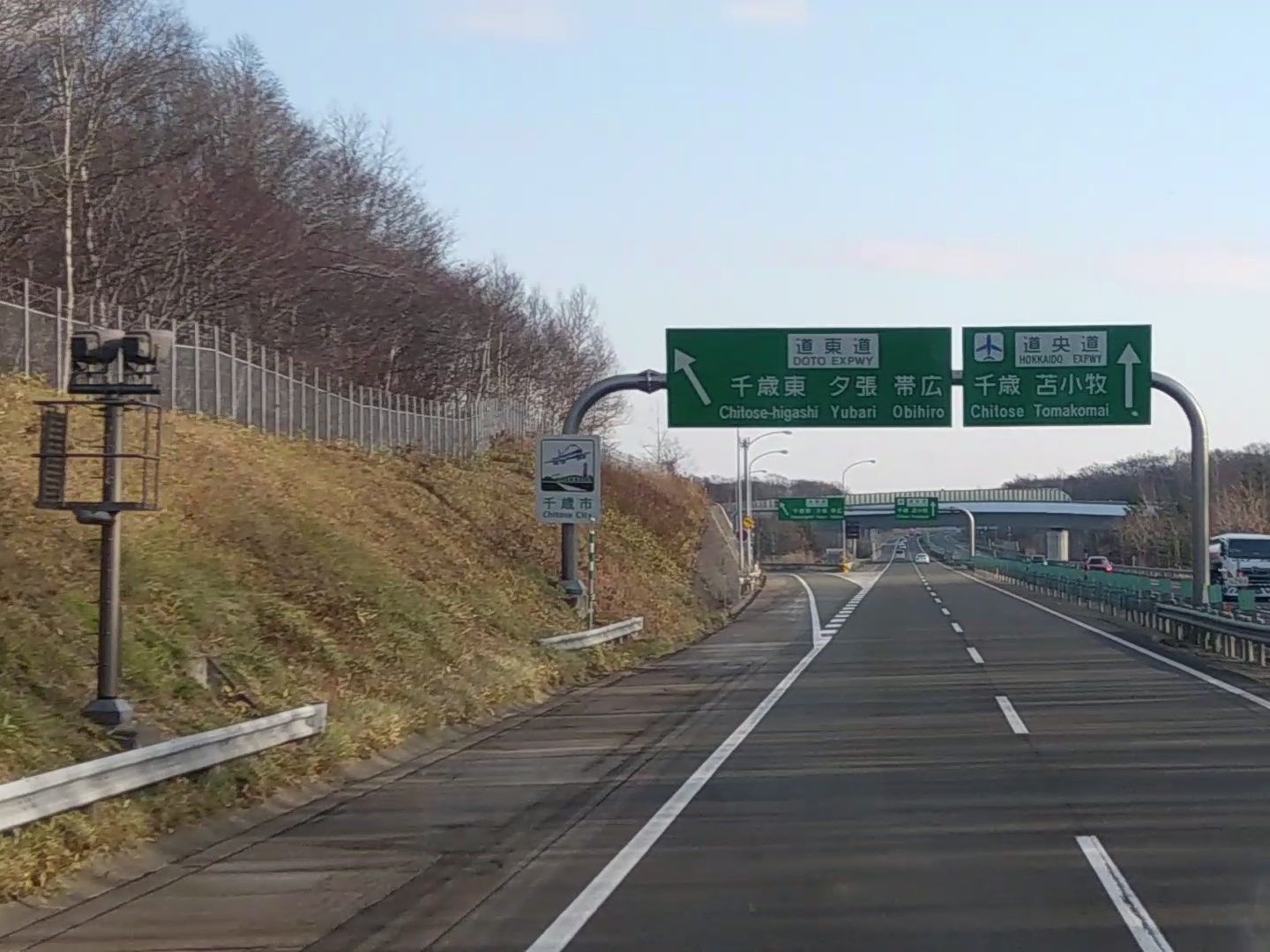 千歳恵庭ジャンクション・分岐部-1・方面及び方向（108の2-E）（札幌側から、2018年12月撮影）外部照明方式（遠方照明方式）を採用